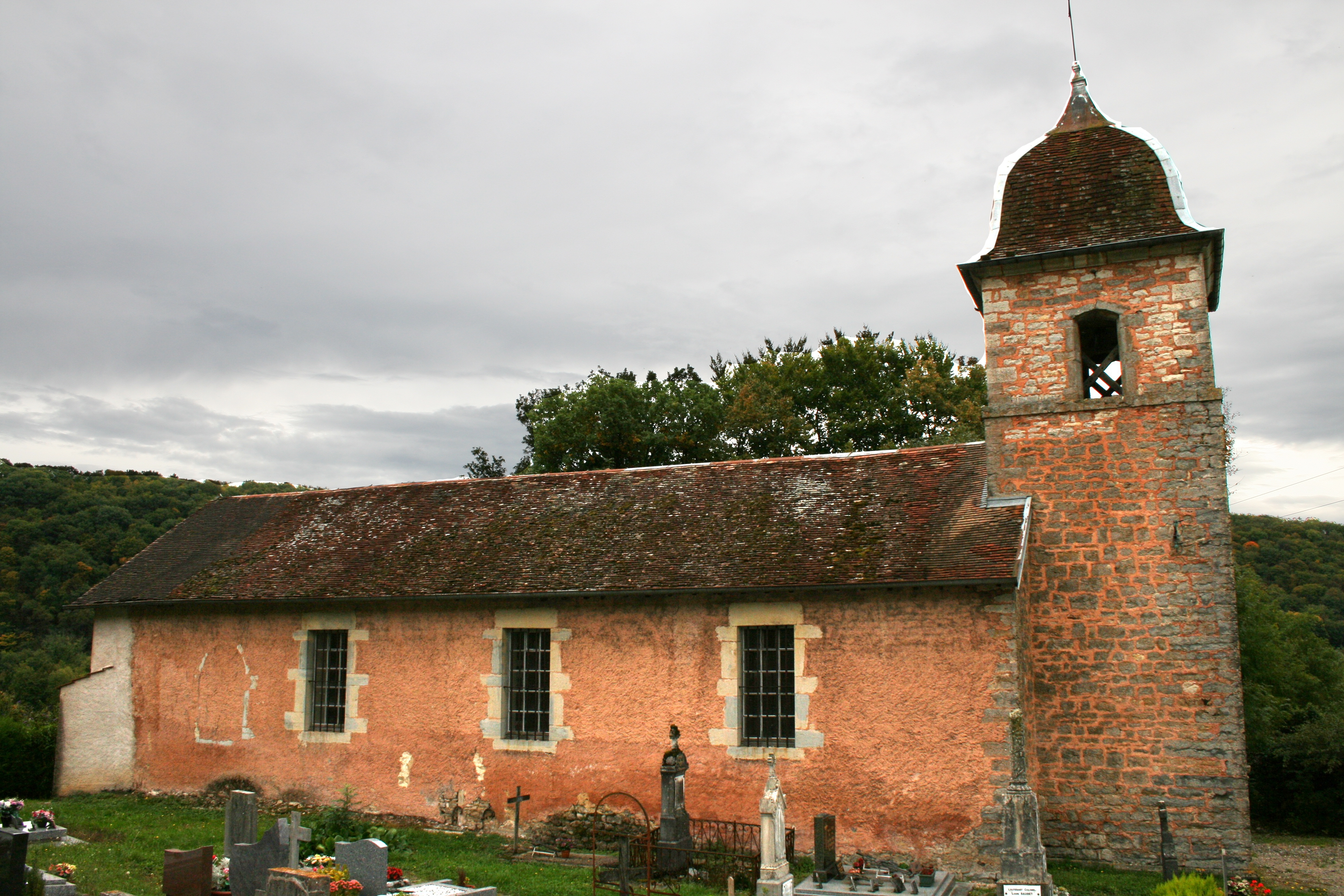 Rancenay église Notre-Dame de l'Assomption des Champs 1725